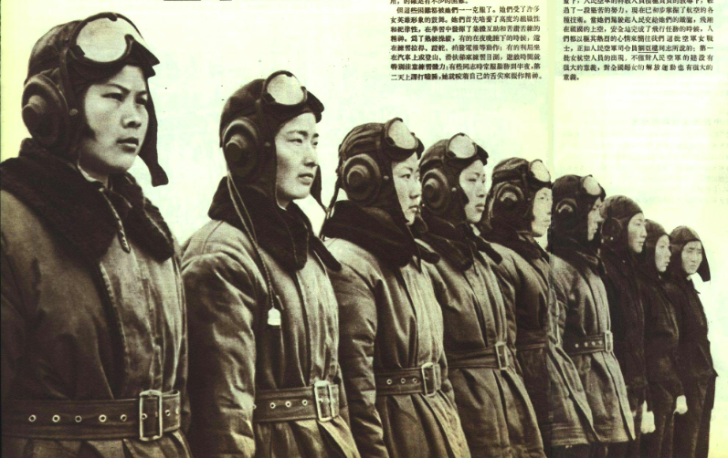 1952年 中国人民解放军空军首批女飞行员